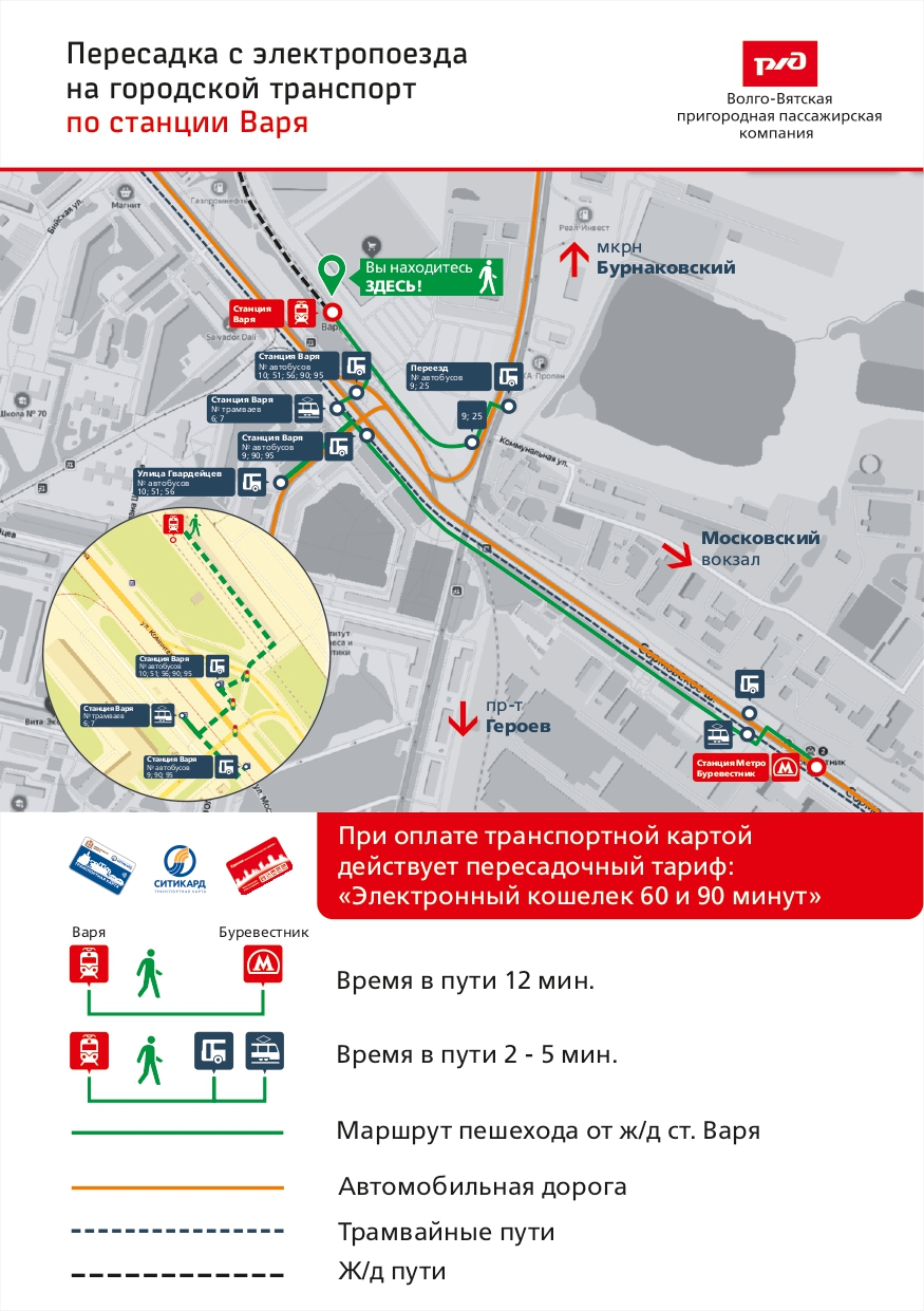 Схема движения (Варя)